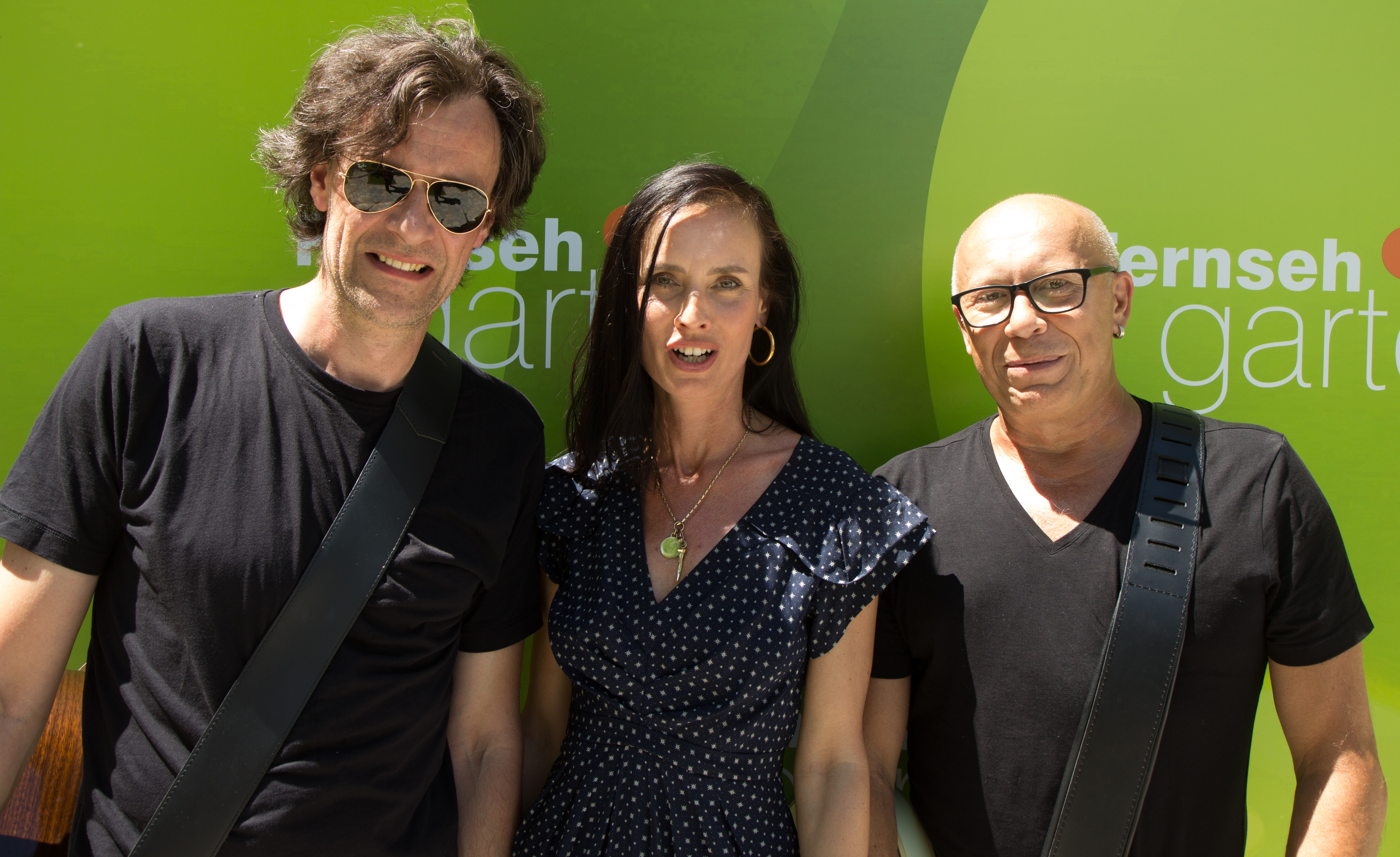 Bell, Book & Candle als Gast beim ZDF-Fernsehgarten am 3. Juni 2018 in Mainz.